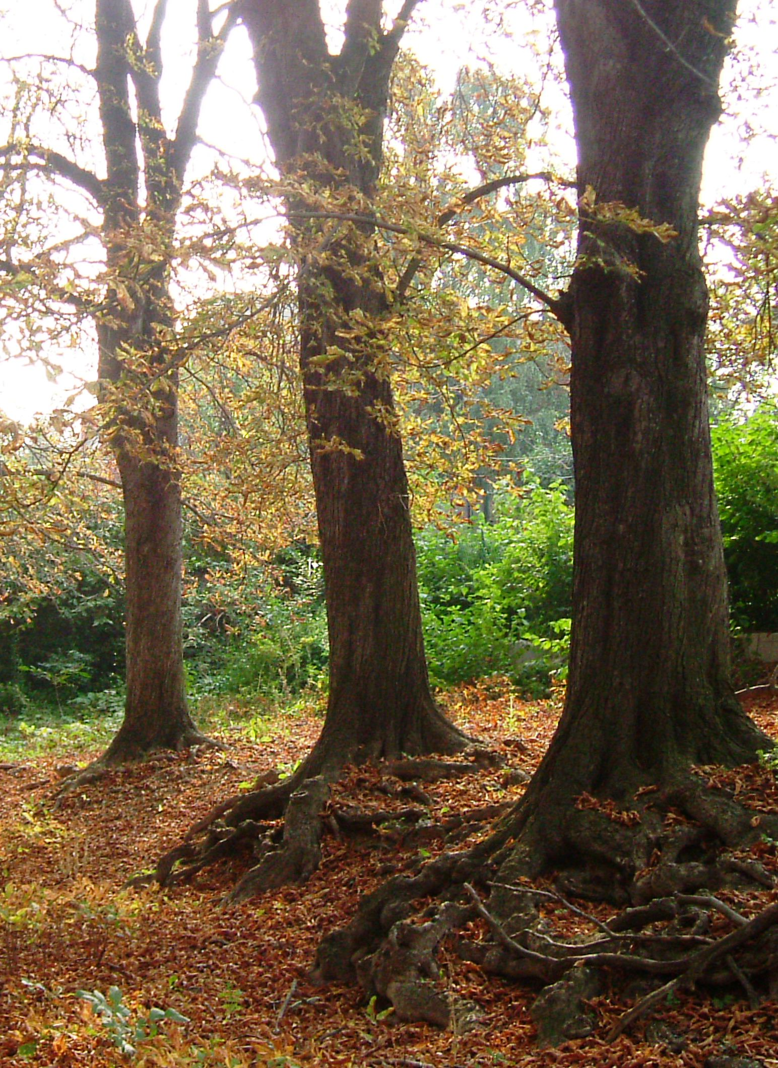 Vadgesztenyefák